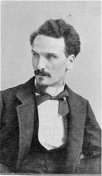 L'Illustration